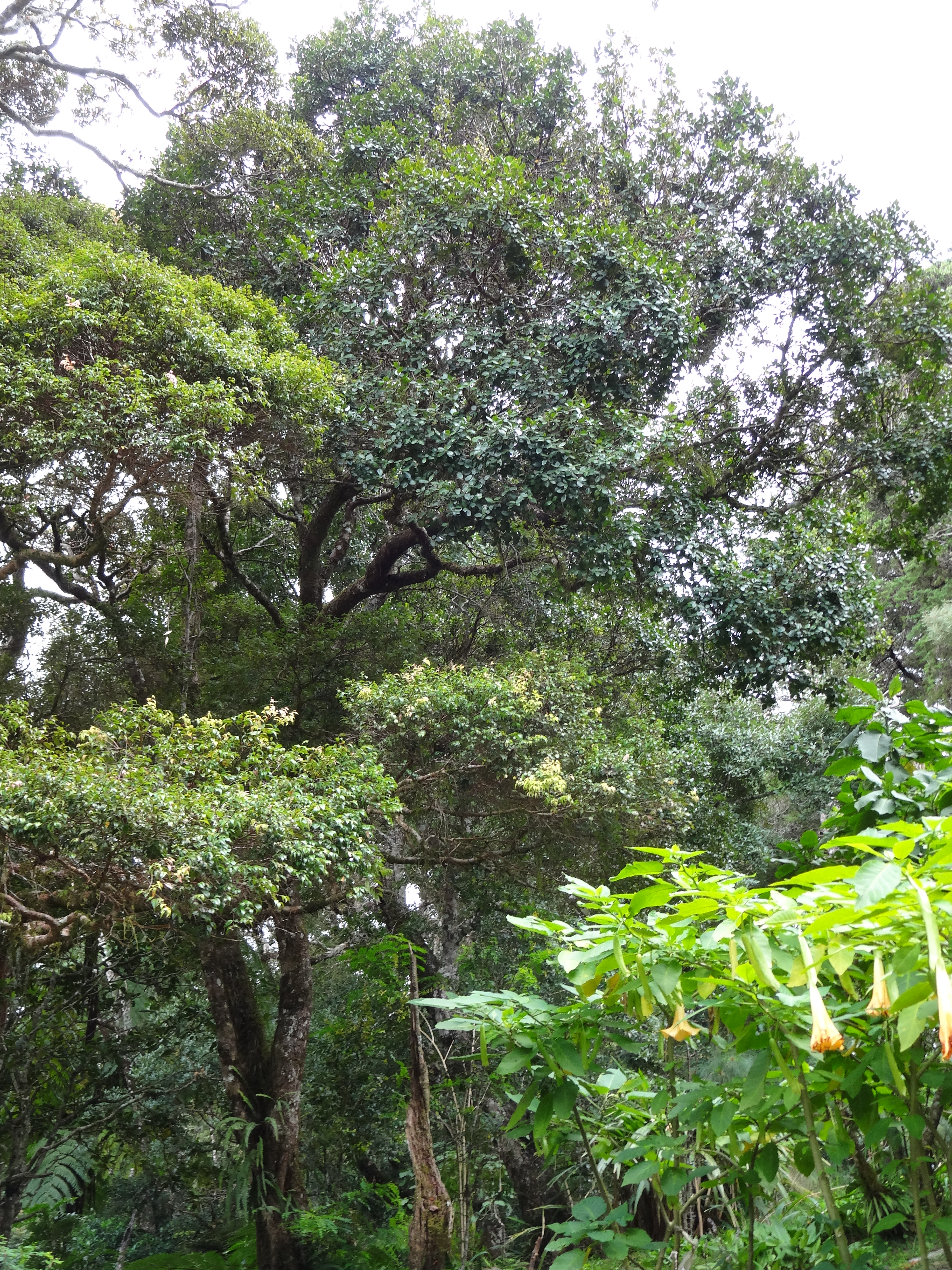 Scolopia crassipes in Hakgala Botanical Garden